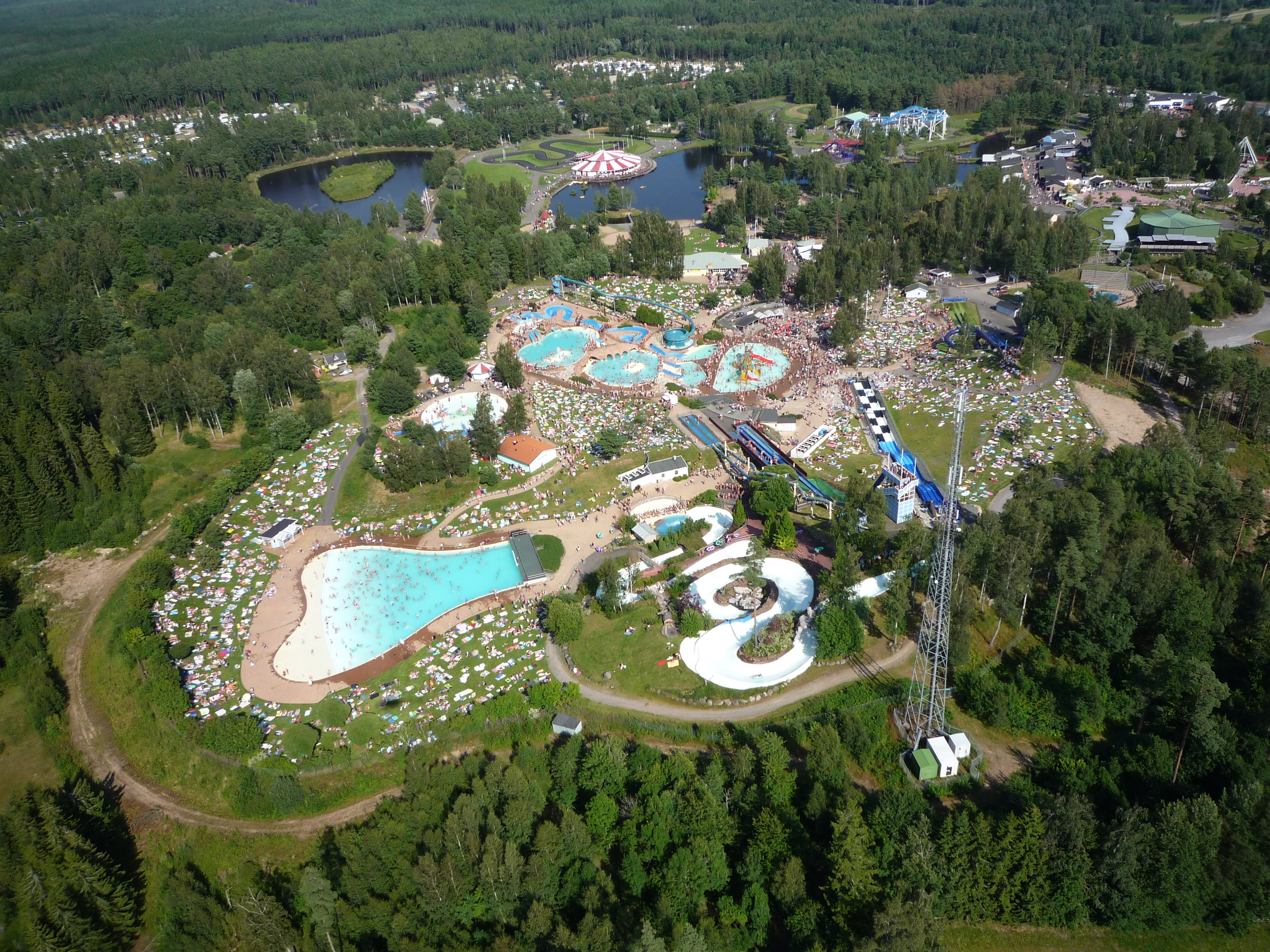 Skara Sommarland, flygfoto